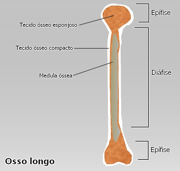 Descrição das regiões de um osso longo.